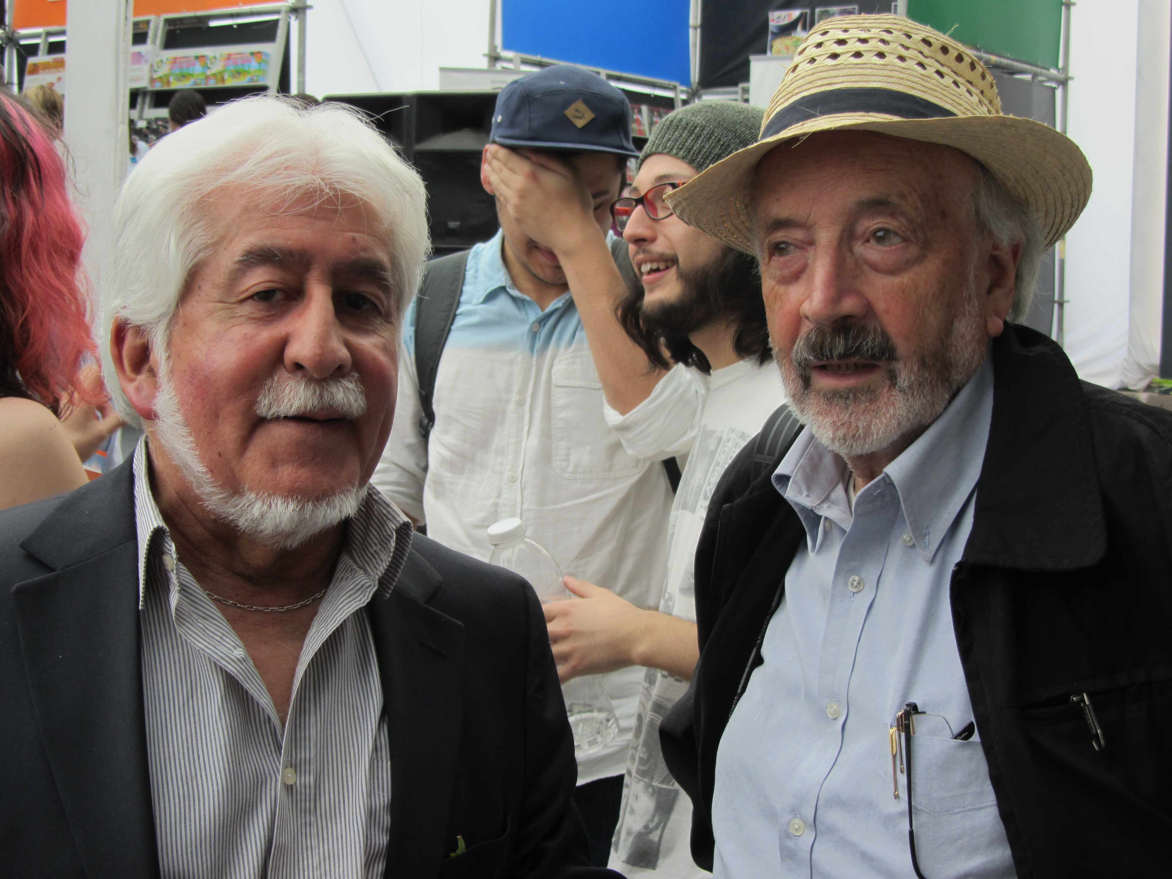 Los poetas chilenos Jaime Quezada y Floridor Pérez en la Feria Internacional del Libro de Santiago 2015